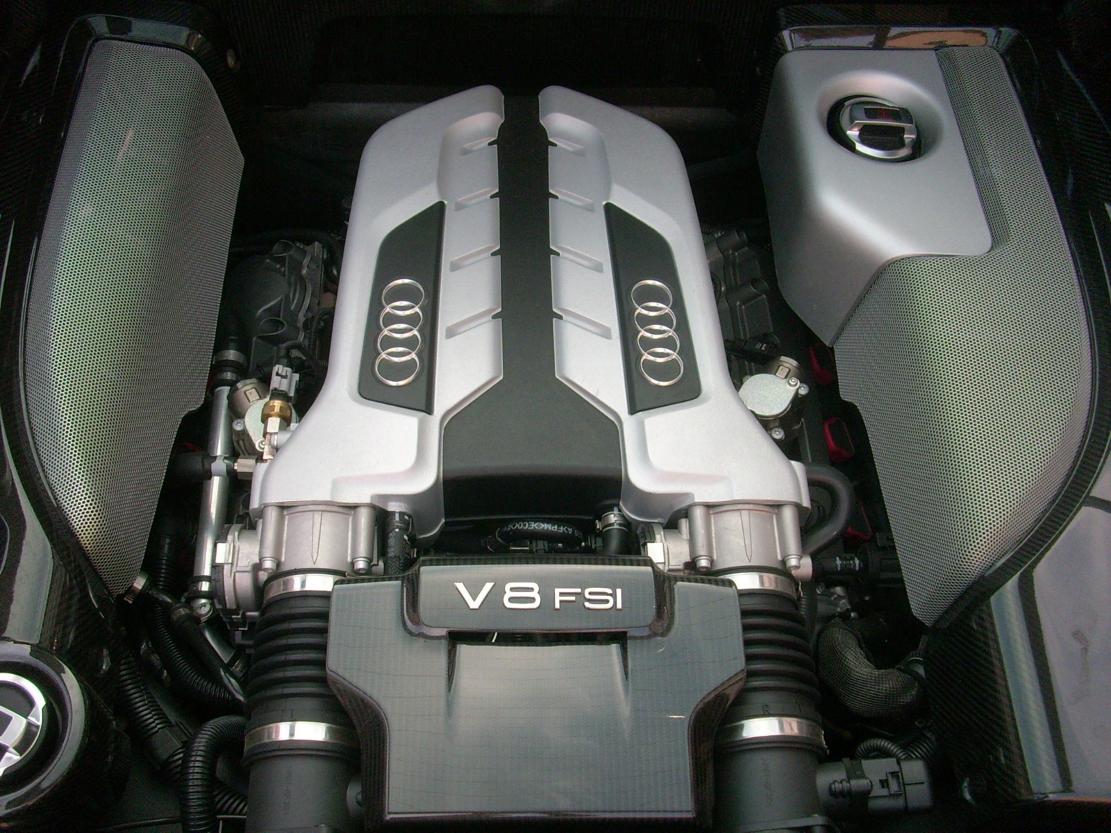 Audi R8 motor engine